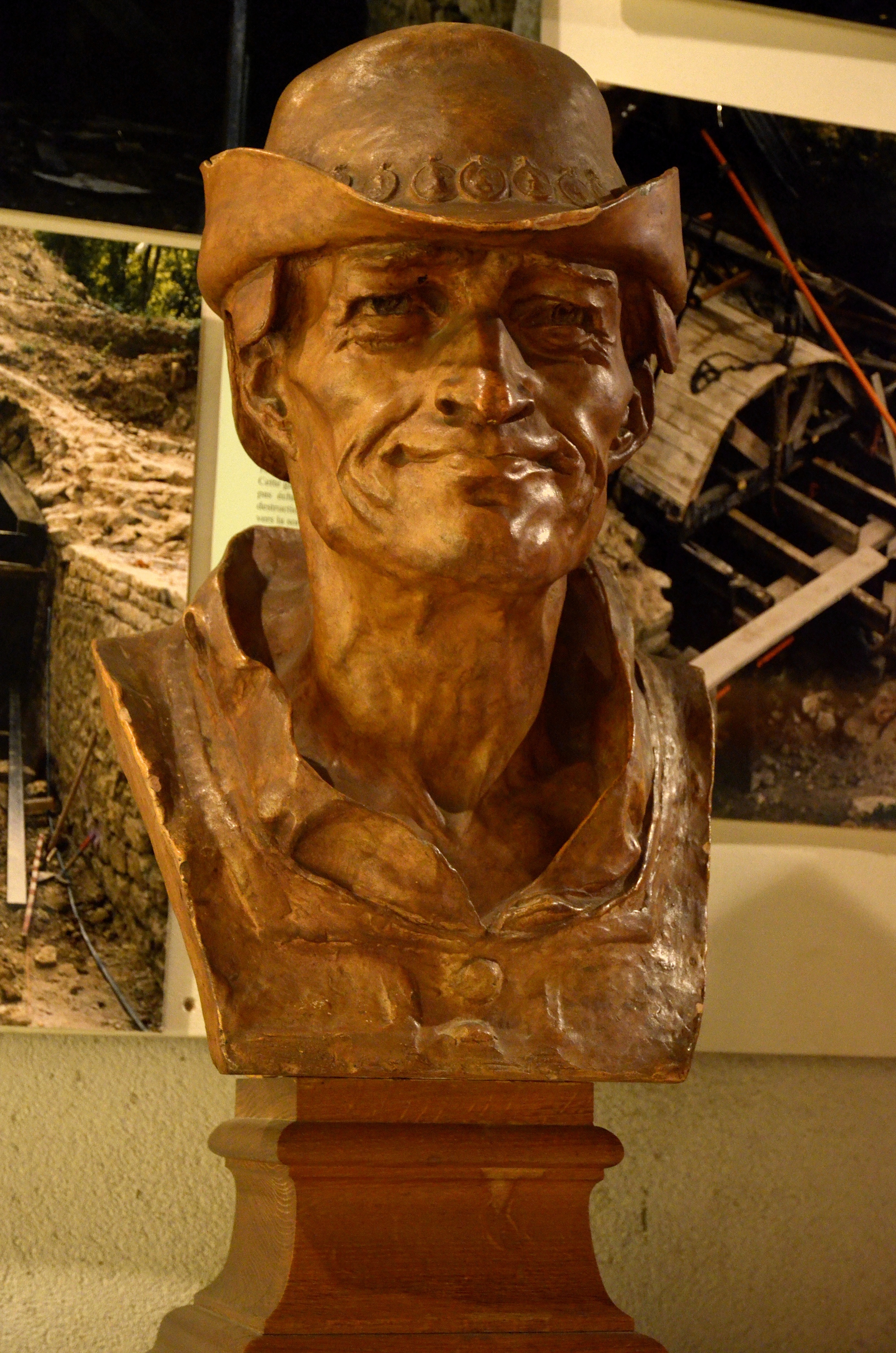 Buste de Louis XI réalisé par Jean Baffier (février 1910), Musée Saint-Vic de Saint-Amand-Montrond (Cher).